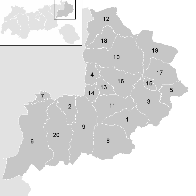 Leere Karte mit den Gemeinden im Österreichischen Bezirk Kitzbühel